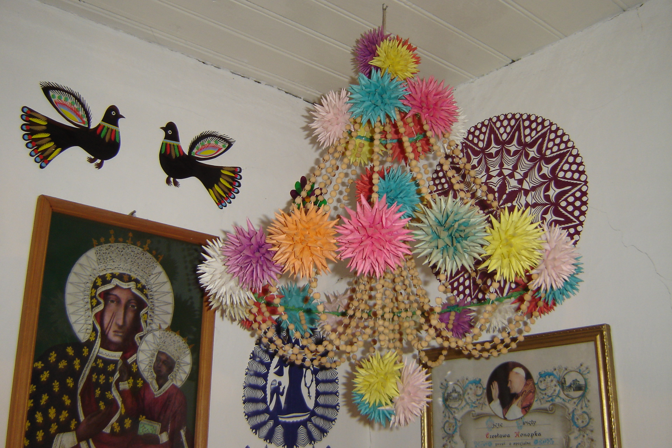 Kierec ozdobny - wyk. Stanisława Konopka Kadzidło